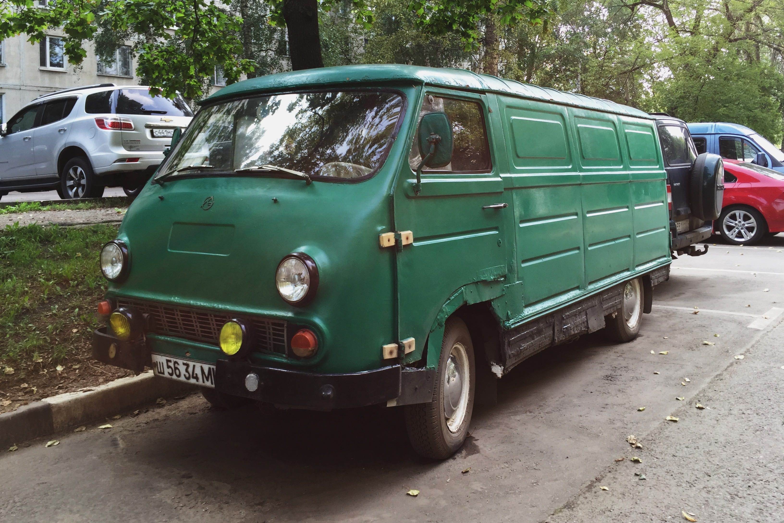 Холмогорская улица. Микроавтобус ЕРАЗ-762 с сохранившейся ереванской эмблемой.